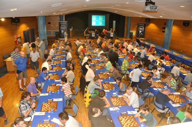 Sala Palmanova, Sede del Calvià Chess Festival